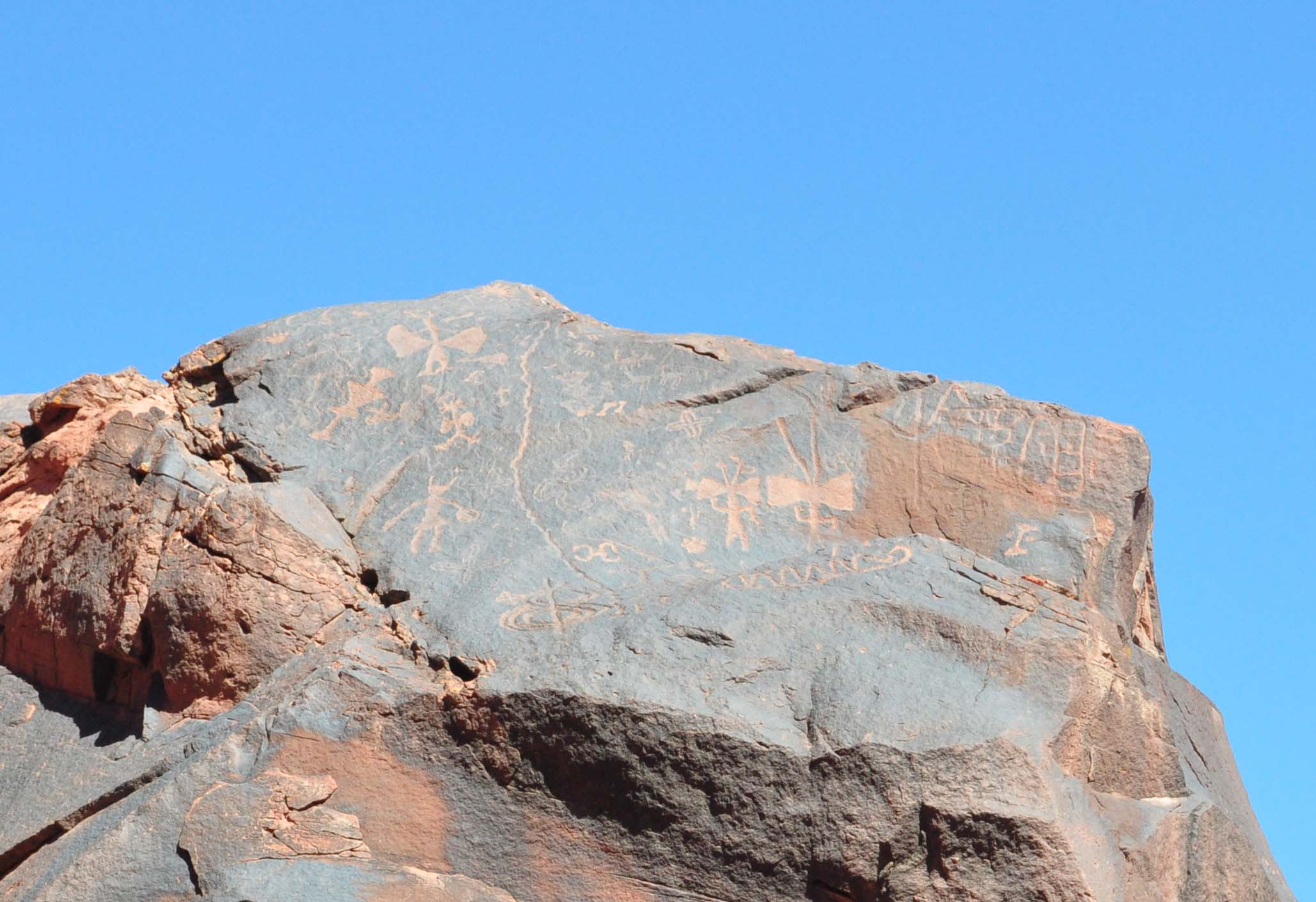 Petroglifos en el Parque Nacional Talampaya